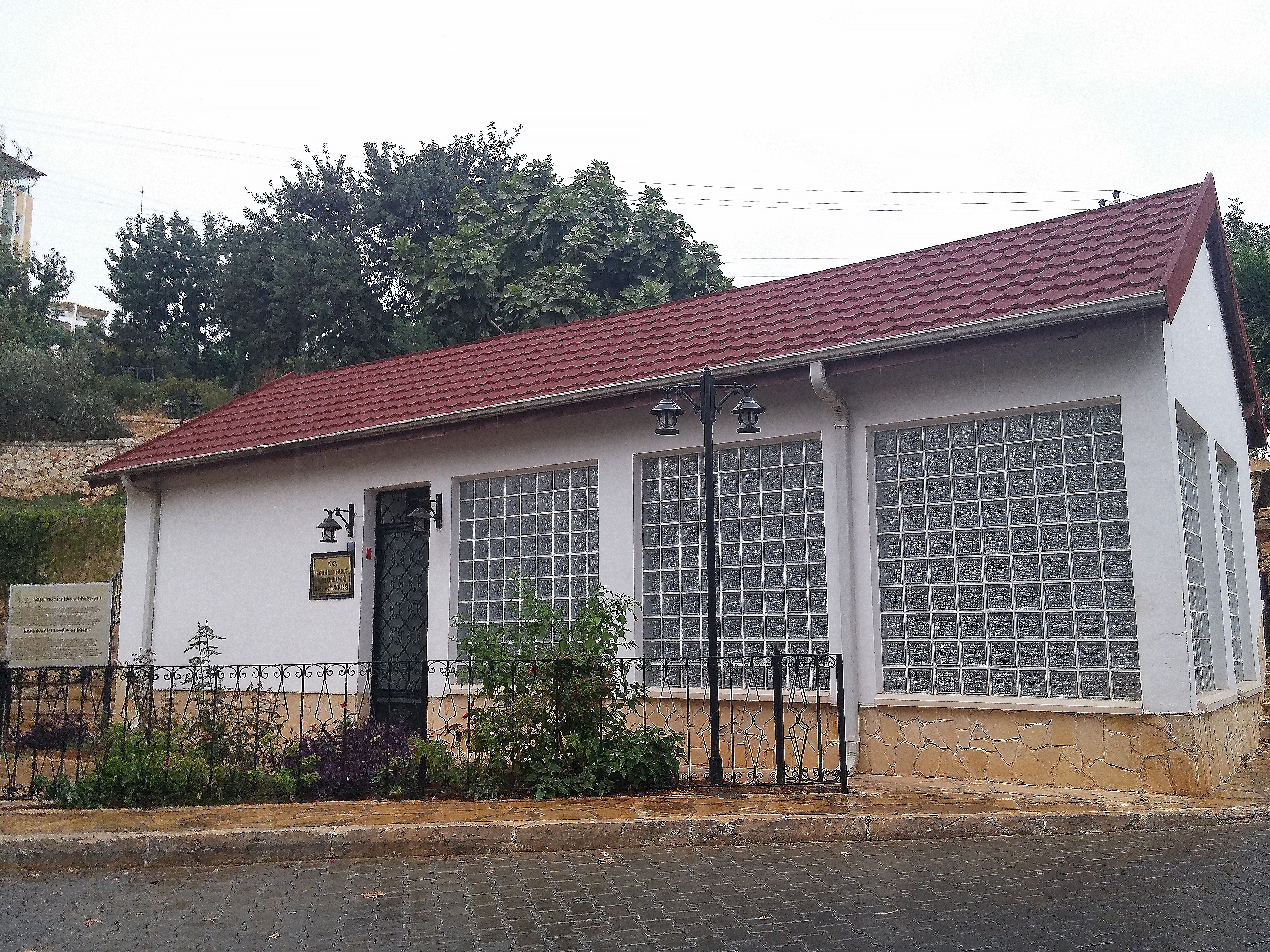 Narlıkuyu Mozaik Müzesinden bir görünüm.